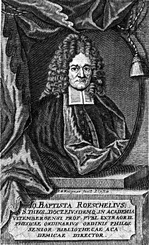 Johann Baptist Röschel (1652-1712) ungarischer Physiker und lutherischer Theologe